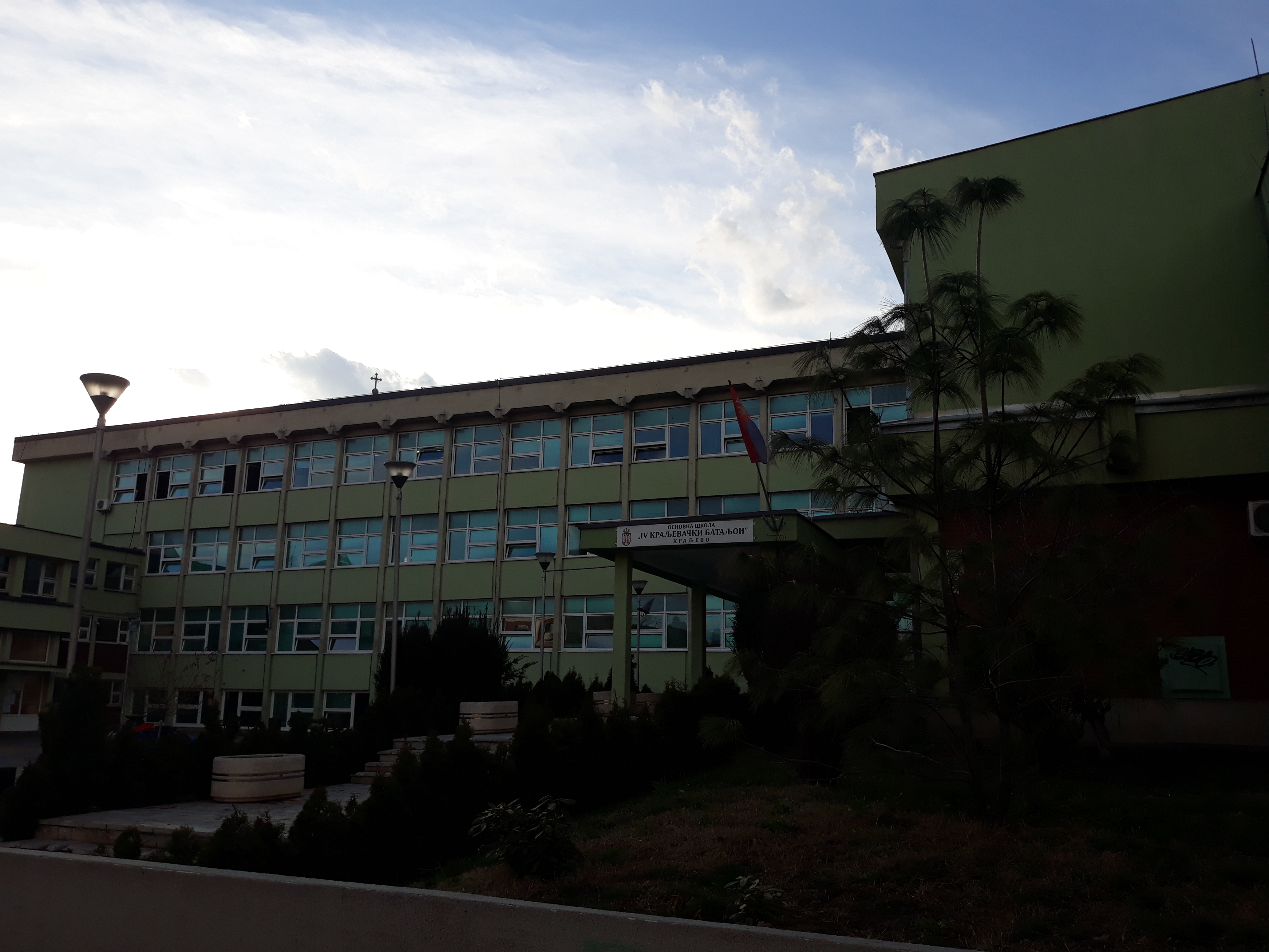 Нова зграда основне школе „Четврти краљевачки батаљон“ у Краљеву.